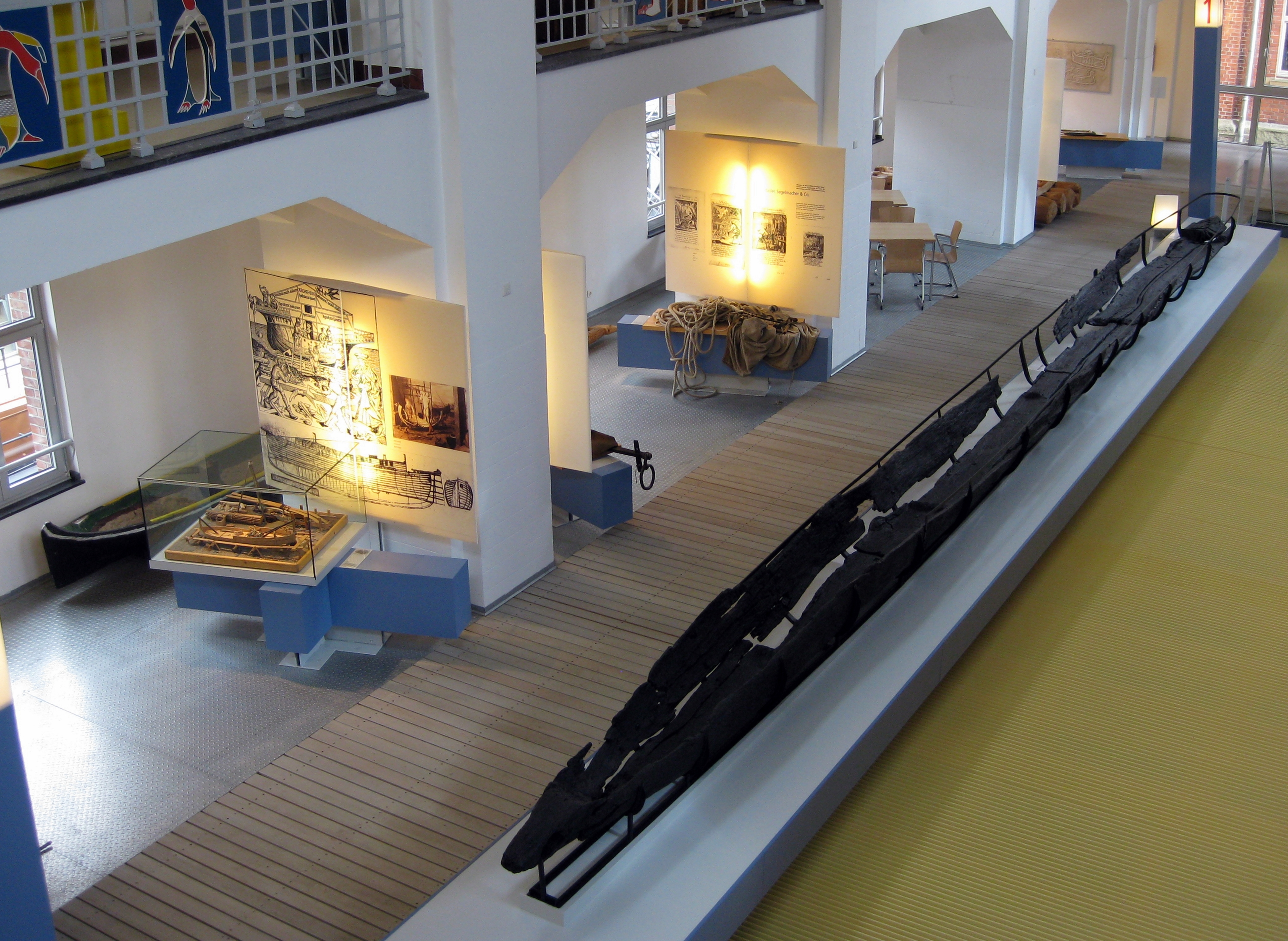 Duisburg, Museum der Deutschen Binnenschifffahrt: Exponate; u.a. ein über 15m langer Einbaum (aufgefunden in der Lippe bei Gartrop-Bühl)